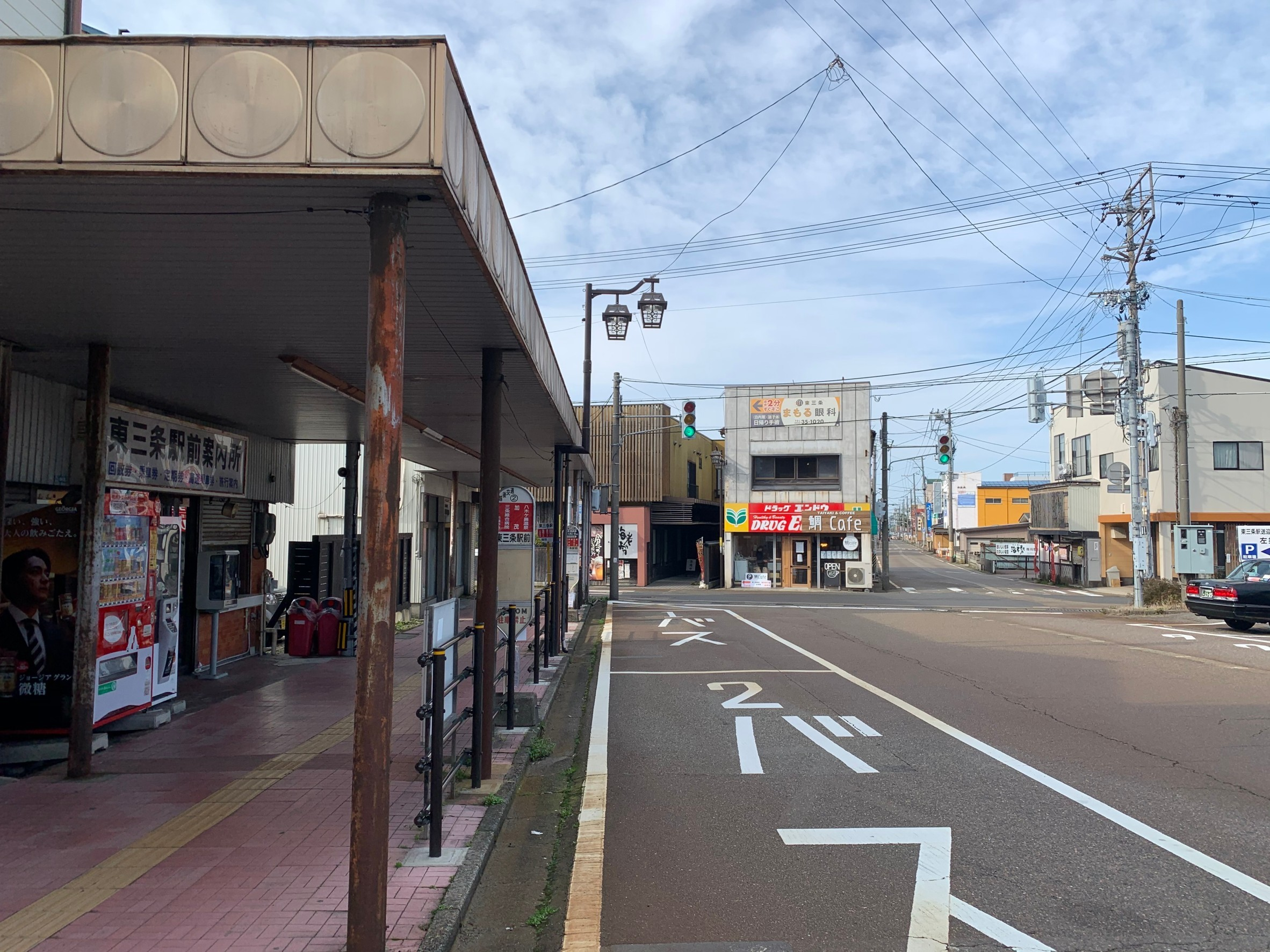 東三条駅 北口駅前風景と越後交通東三条駅前案内所（2020年3月）